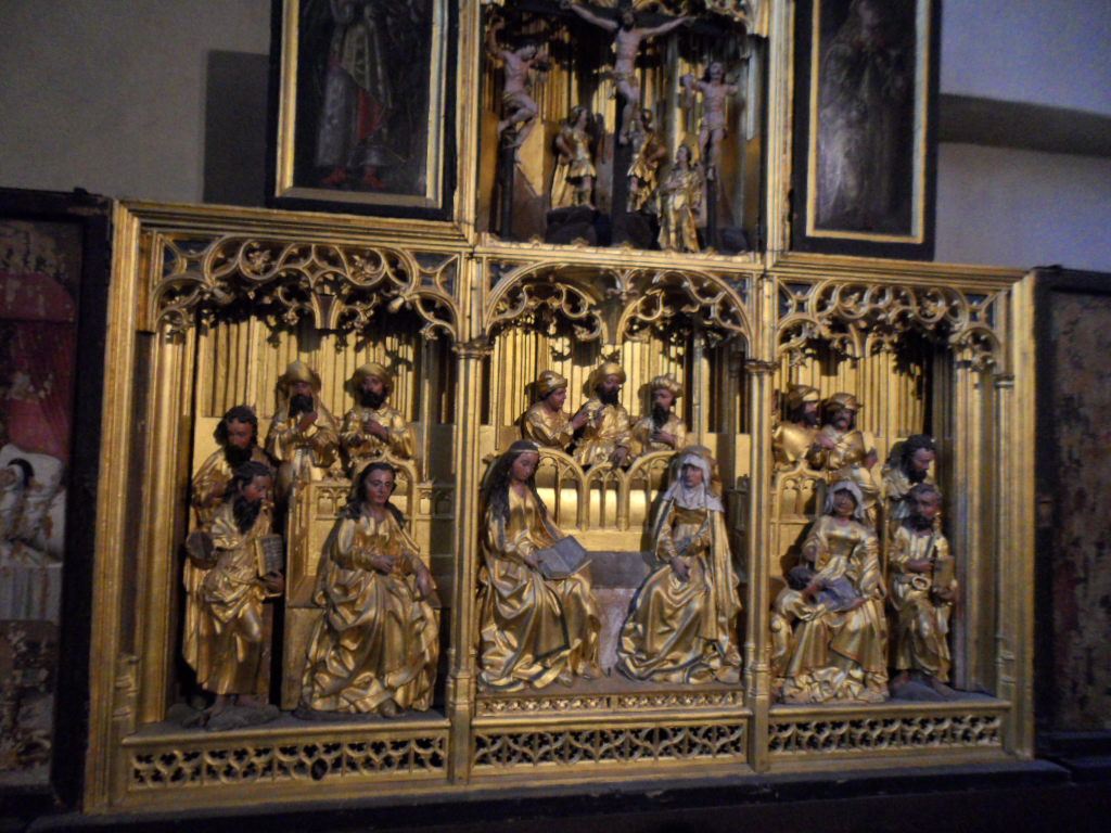 Алтарь Святой Родни в Таллине